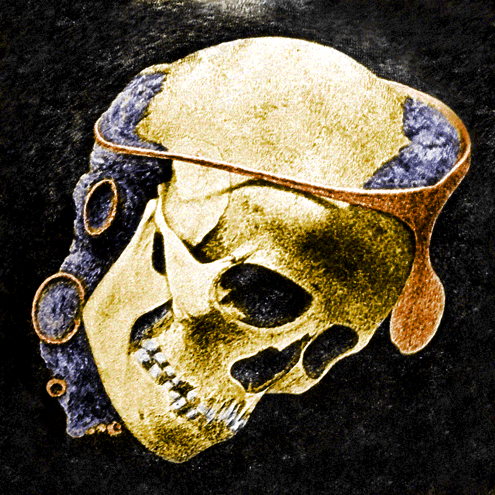 Restos de un cráneo con diadema de plata de la cultura de El Argar, Bronce Pleno en el sur de España, cráneo de la sepultura 62 « Las alhajas, consisten en una diadema de plata, pendientes de oreja, de cobre y de plata, y collar, de hueso y de serpentina. » (Luis Siret)